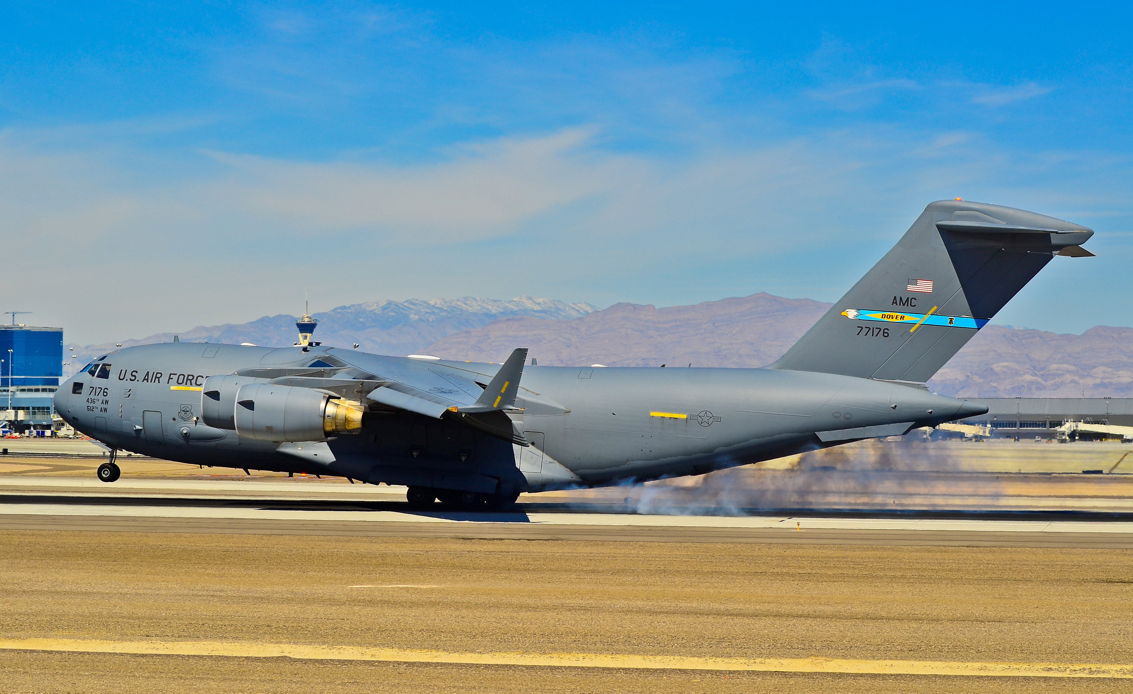 Las Vegas - McCarran International (LAS / KLAS) USA - Nevada, March 20, 2012 Photo: Tomás Del Coro